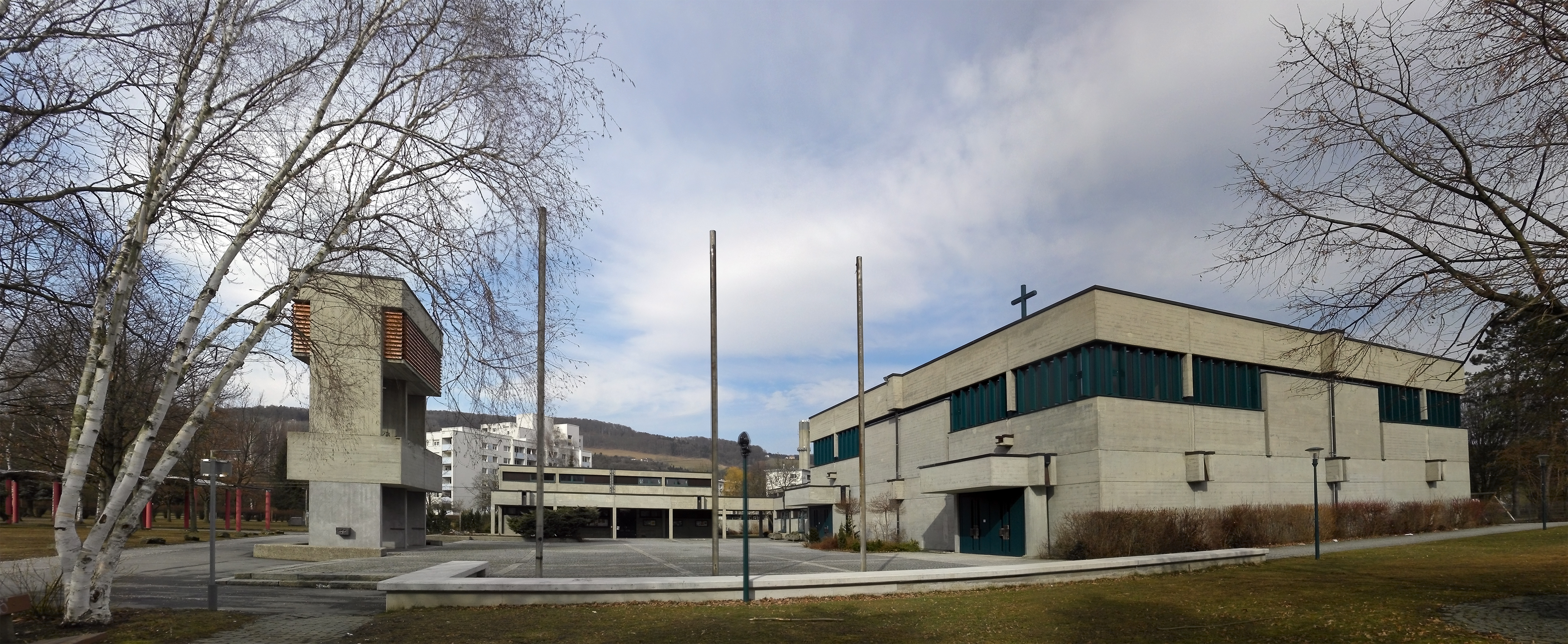 Kath. Pfarrkirche Hl. Geist